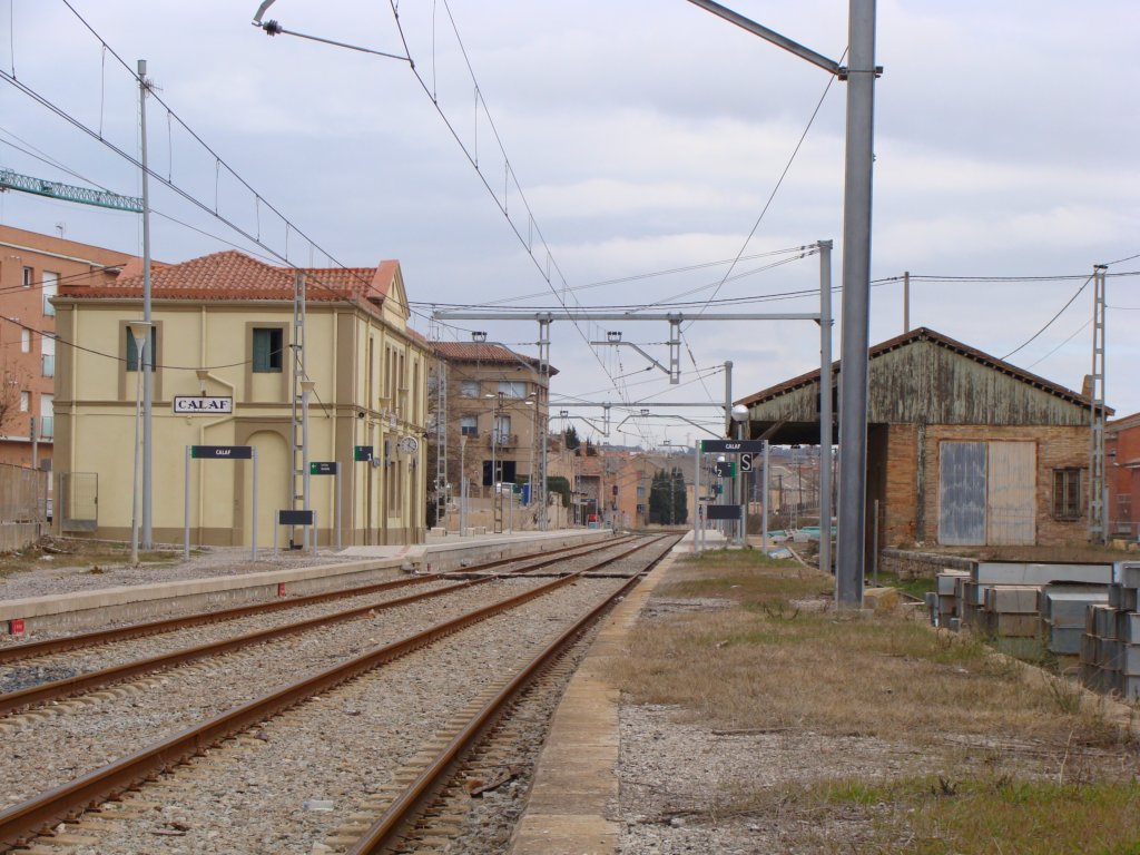 Encara que molt solitària, la conserven prou be, l'estació de la Renfe a Calaf. Aunque muy solitaria, la conserban muy bien la estación de la Renfe en Calaf.